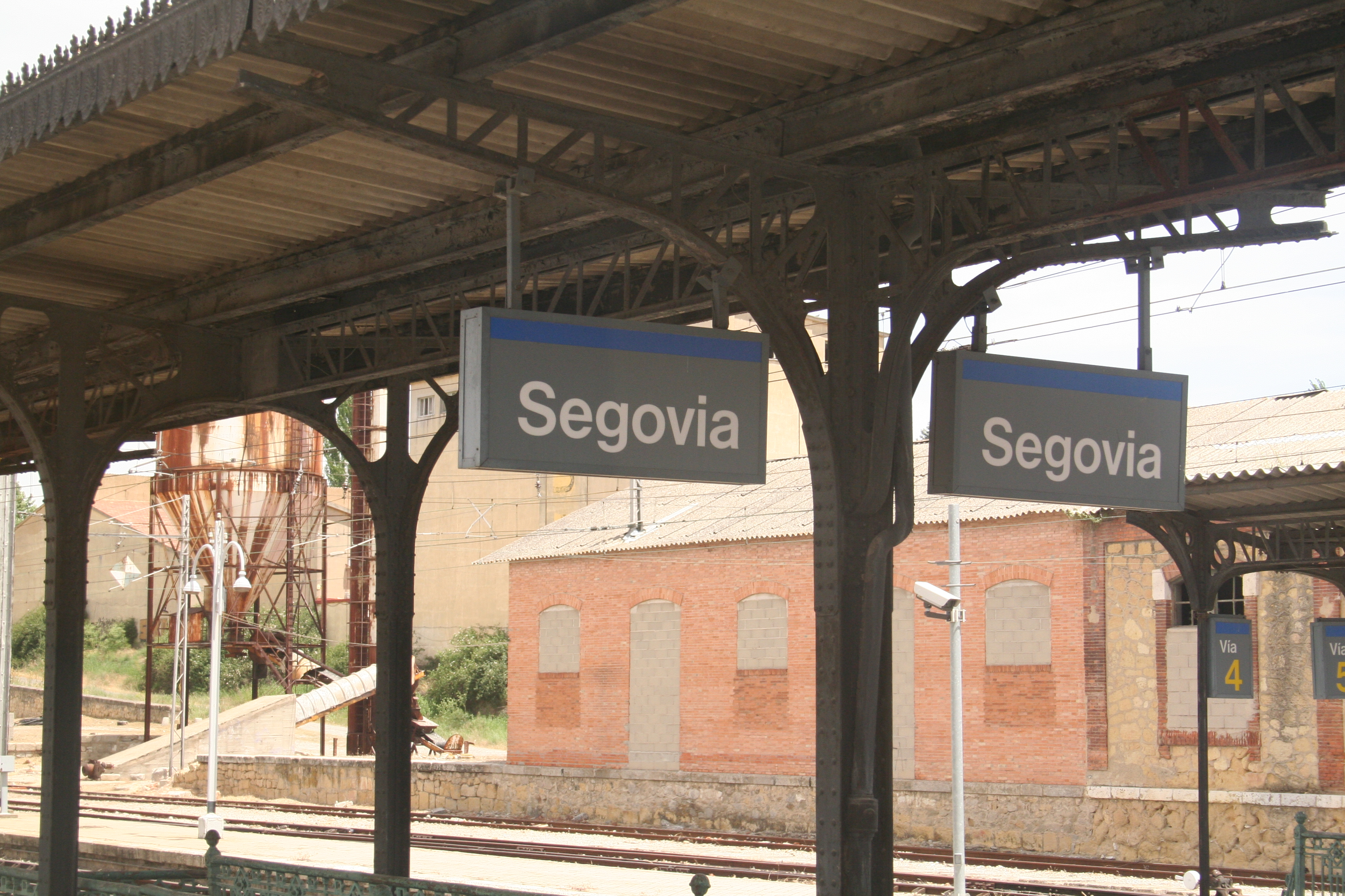 Anden de la estación de Segovia (Castilla y León).